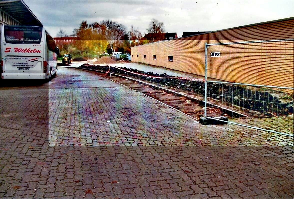 Entfernung des letzten Stückes des einstigen Gleisanschlusses von Thiel.